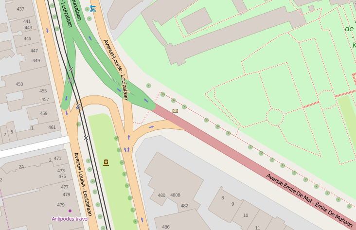 Arpetan: Plan sur l'adresse 453 Avenue Louise + avenue Émile De Mot à Bruxelles. Le monument de Jean de Selys Longchamps se trouve au carrefour des deux avenues.